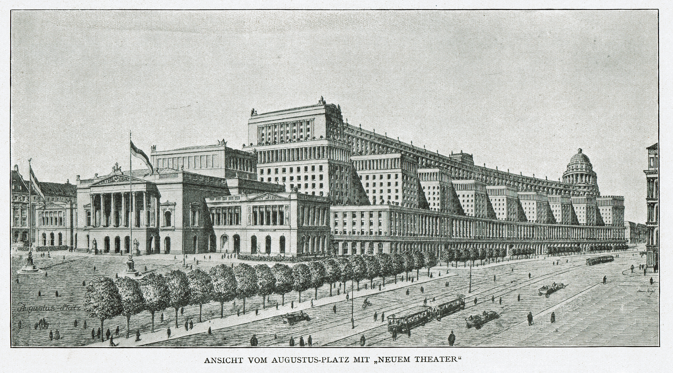 Weltmessepalast vom Augustusplatz gesehen, geplant 1921